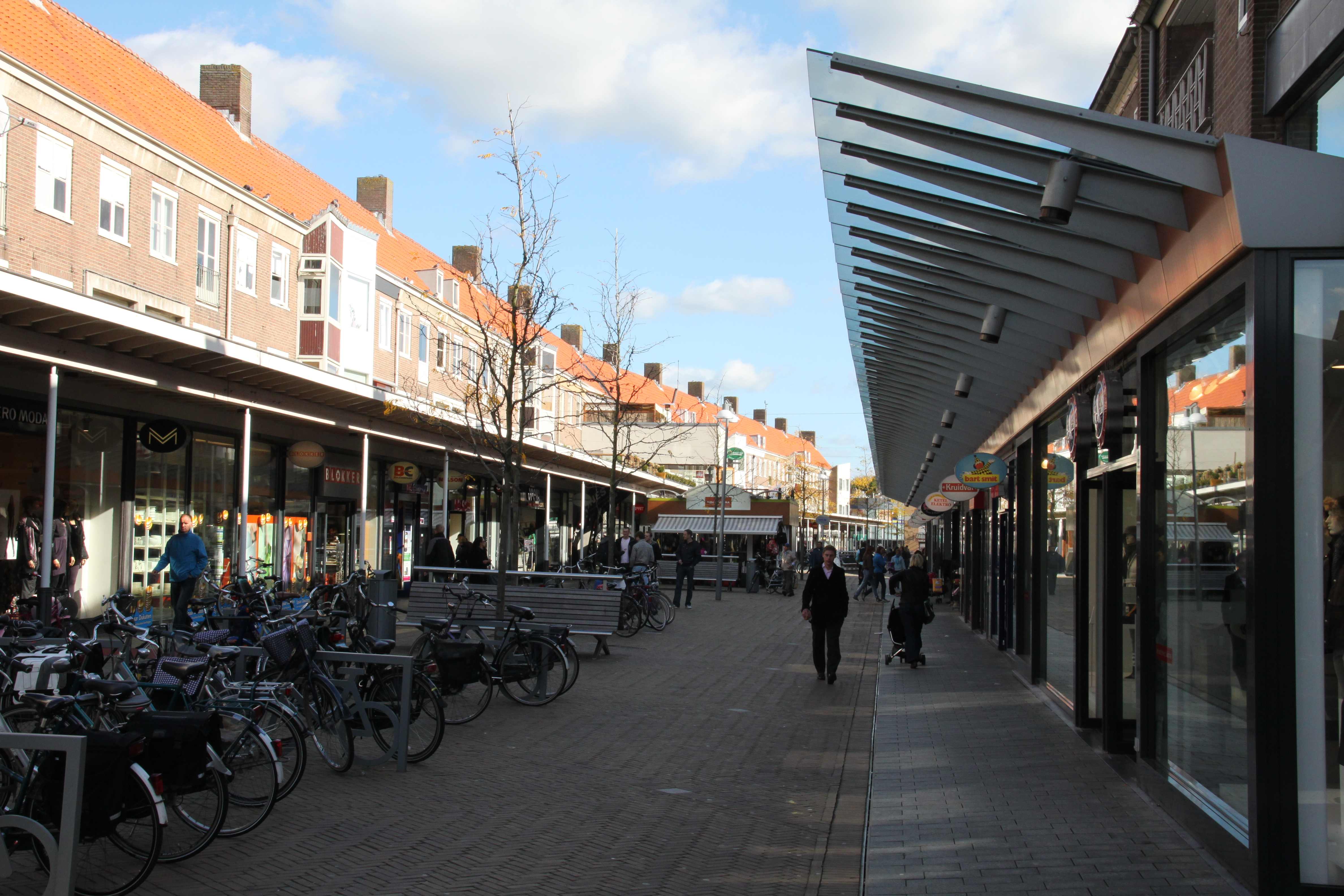 winkelcentrum Emmeloord